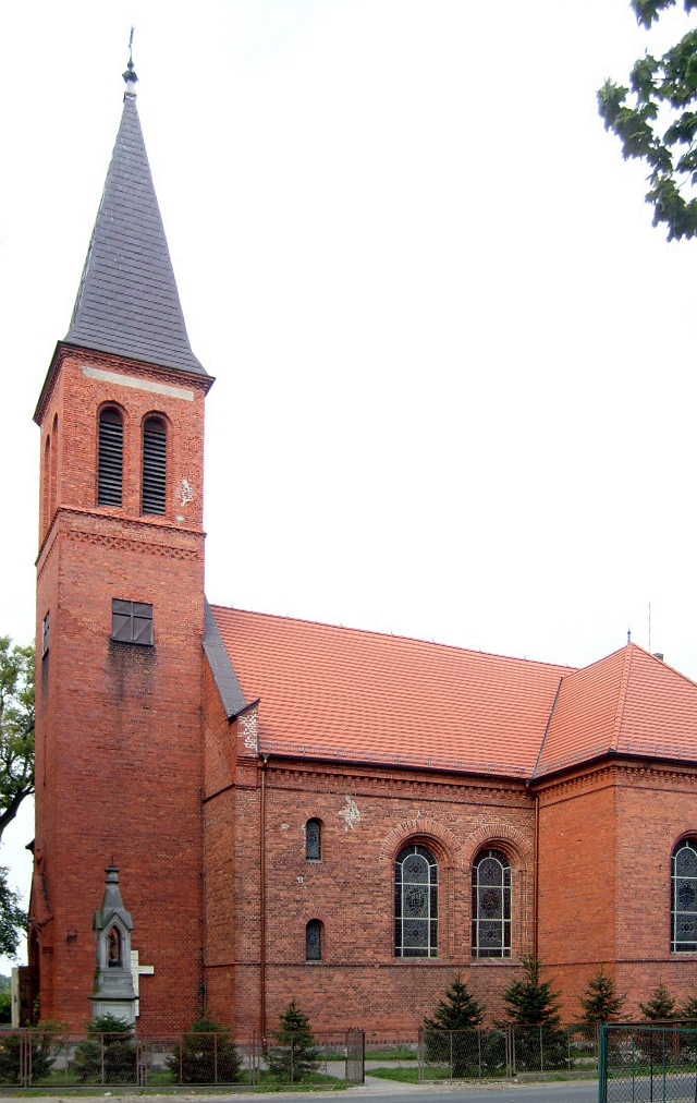 The church in Osielsko, Poland